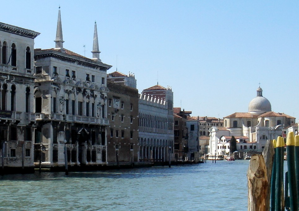 Venezia: veduta del Canal Grande con Palazzo Belloni Battagia, Fontego del Megio, Fontego dei Turchi e, sull'altra sponda a destra, la chiesa di San Geremia.